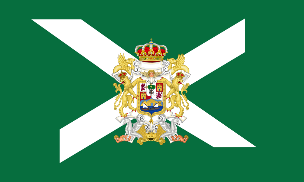 Bandera de Castro Urdiales. De fondo, cruz de San Andrés con aspa de color blanco sobre verde olivo. En su centro se localiza el escudo de la ciudad de Castro Urdiales, oficial por real cédula de Felipe V el 23 de Marzo de 1745.